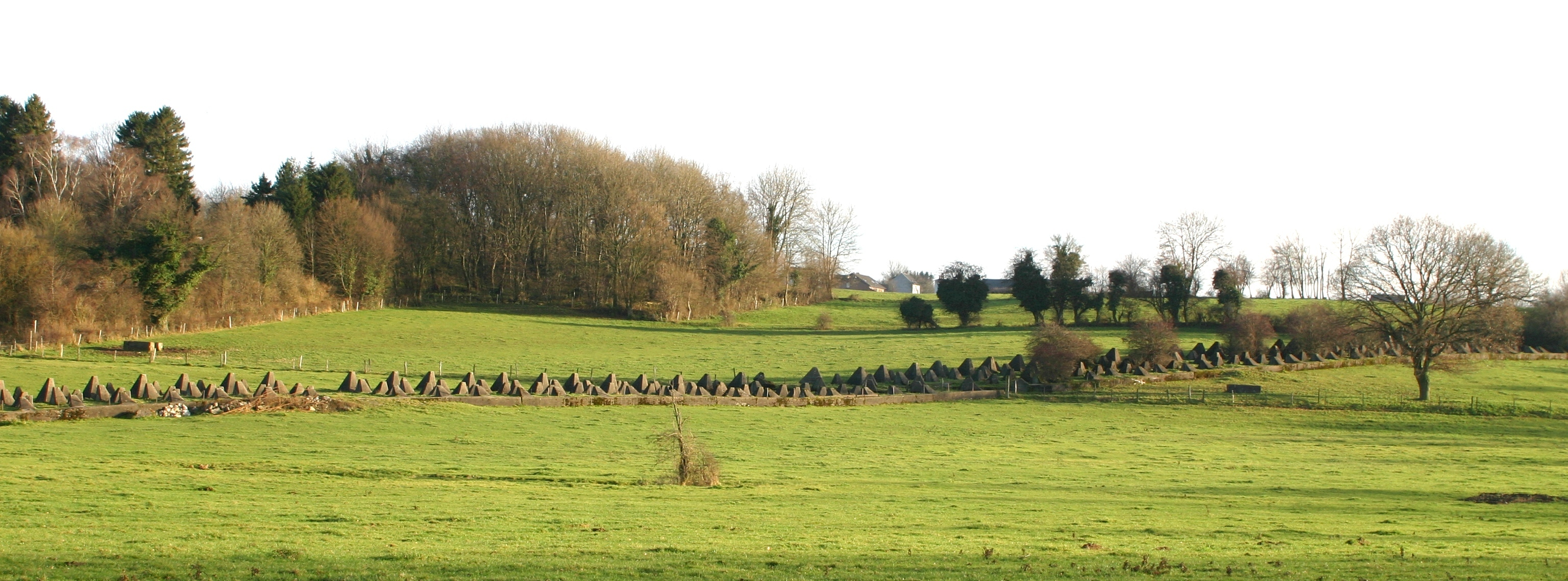 Bockellinn bei Schmithof. Kategorie:Festungen